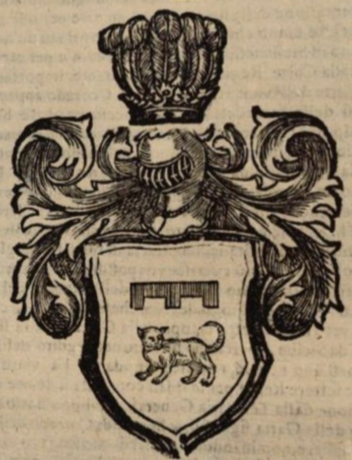 stemma Casata della Gatta